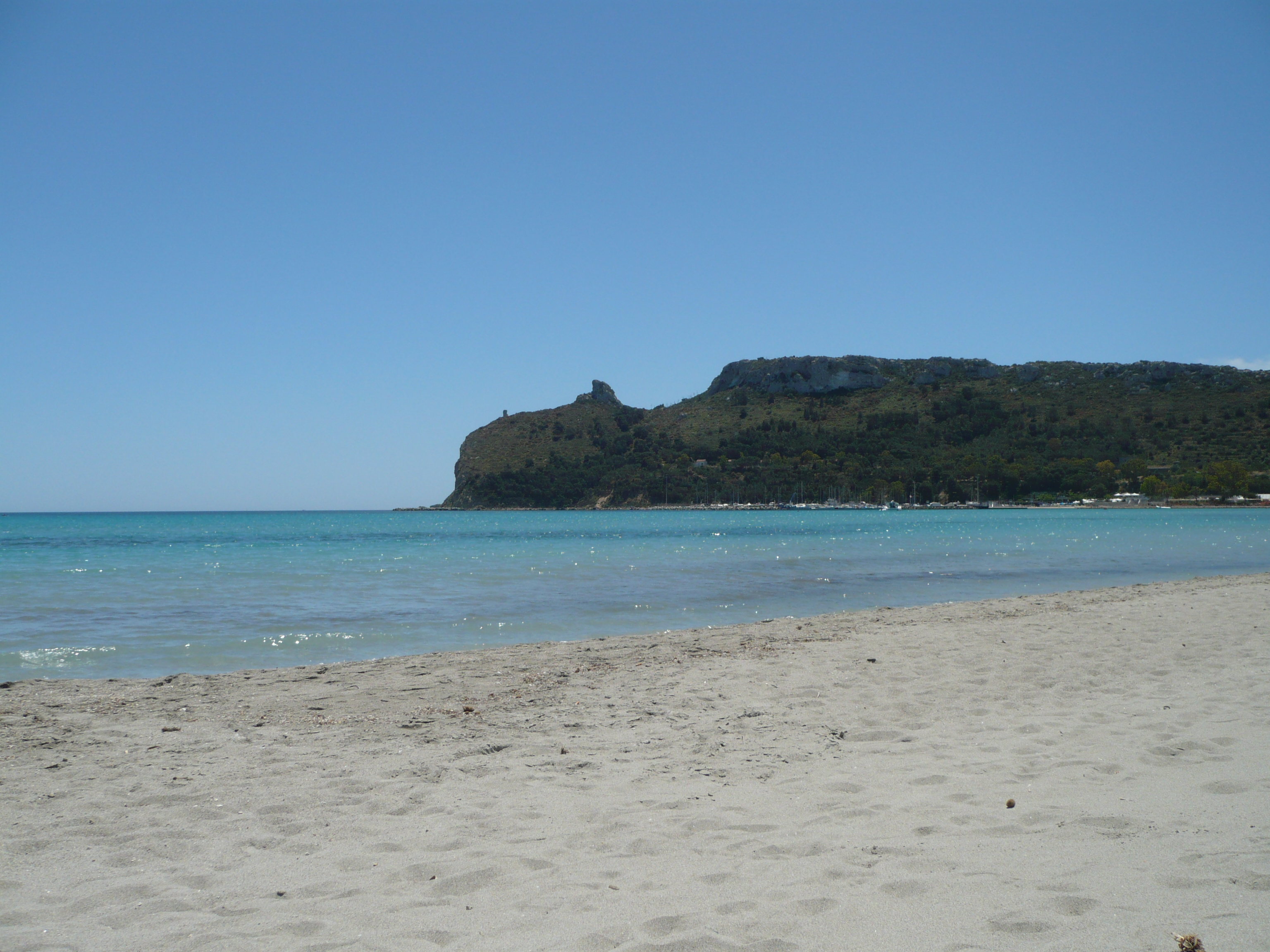 Plage "Il Poetto", à Cagliari, Sardaigne, Italie